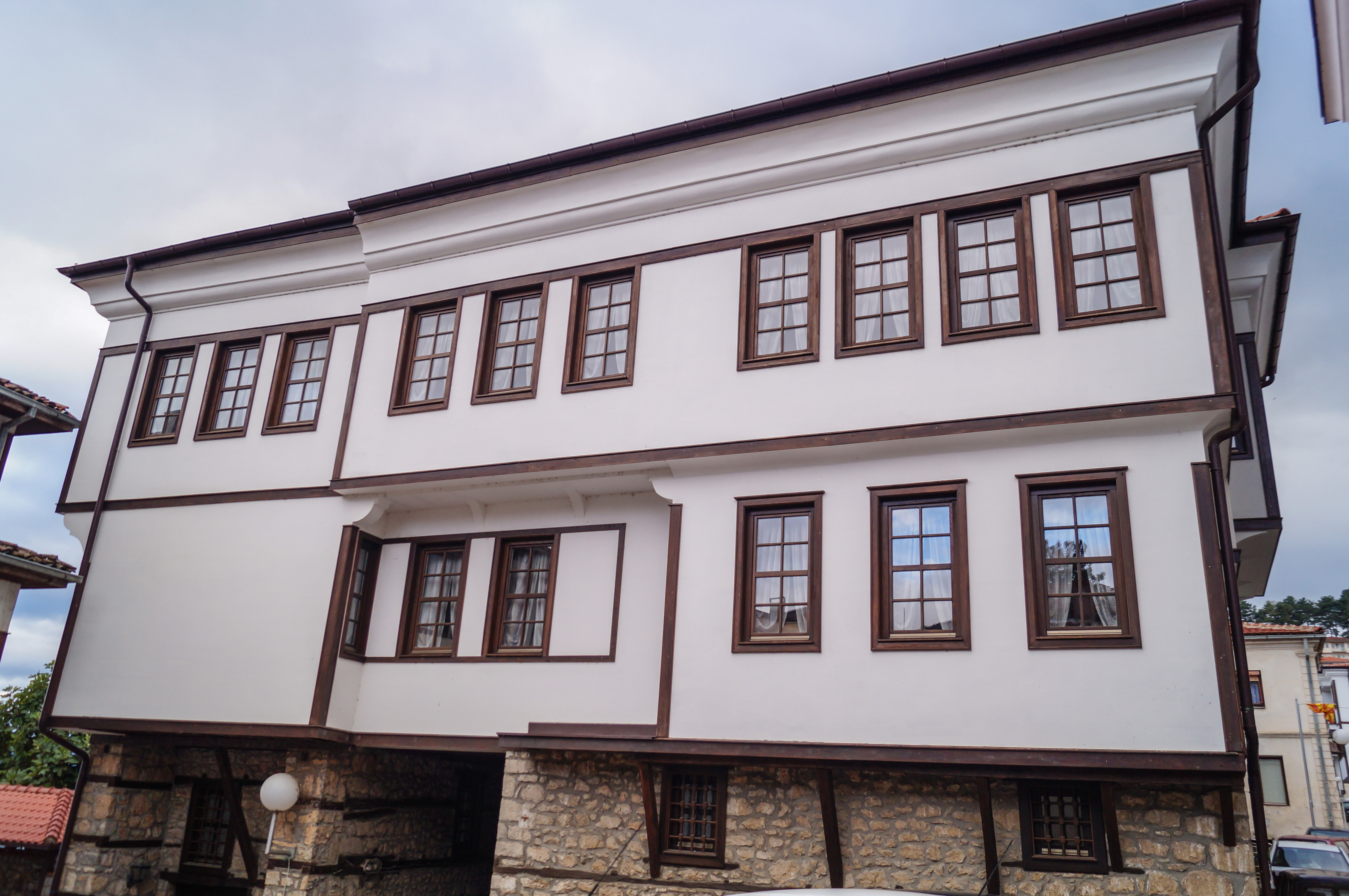 Куќата на Уранија, односно куќата на МАНУ, Охрид.